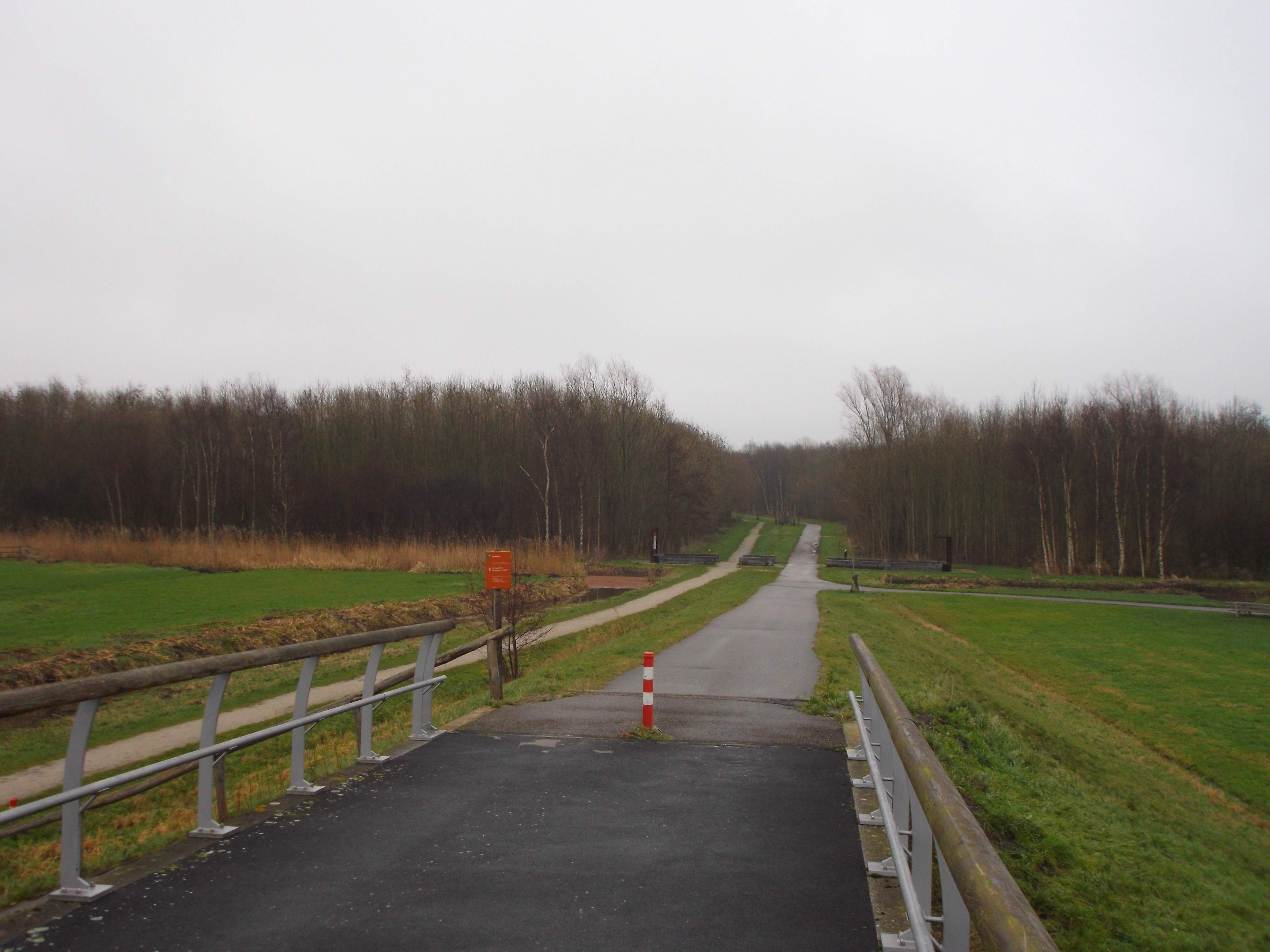 Diemerbos, begin december 2013